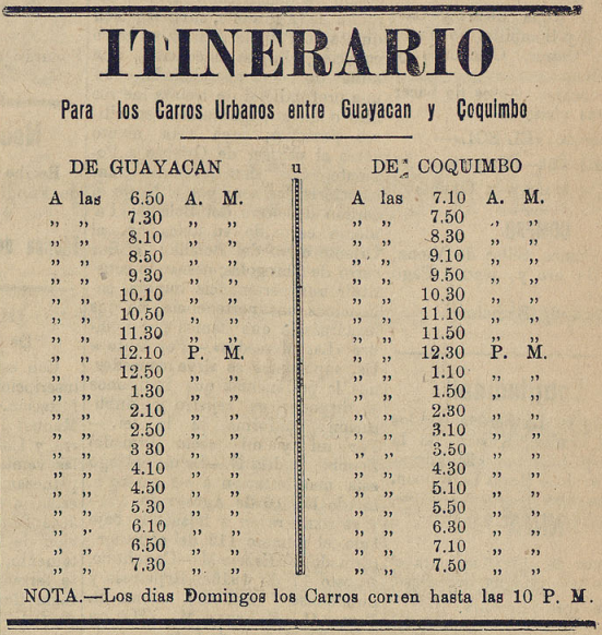 Itinerario de los Carros Urbanos de Coquimbo en septiembre de 1916